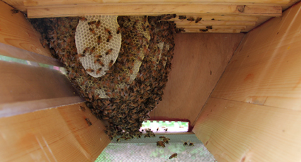 Les premiers jours après l'installation d'une colonie dans une ruche horizontale, les rayons sont construits à partir des lattes qui forment le plafond.